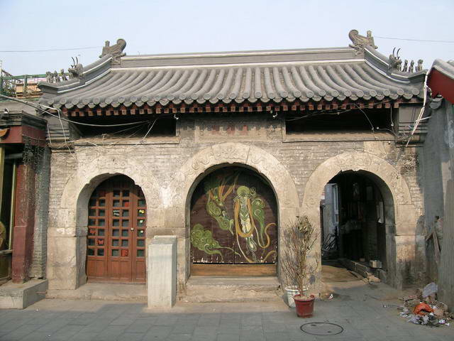 广福观山门 smartneddy 2005年1月22日摄于什刹海烟袋斜街